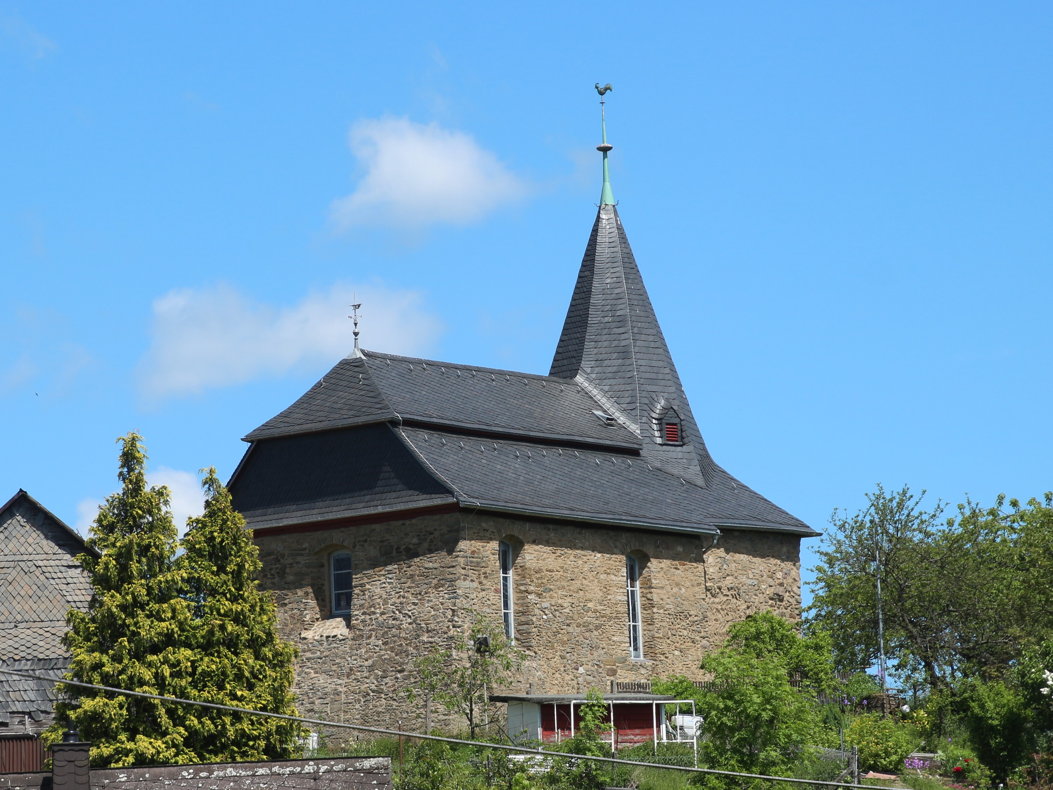 Siehe Bild und Dateiname